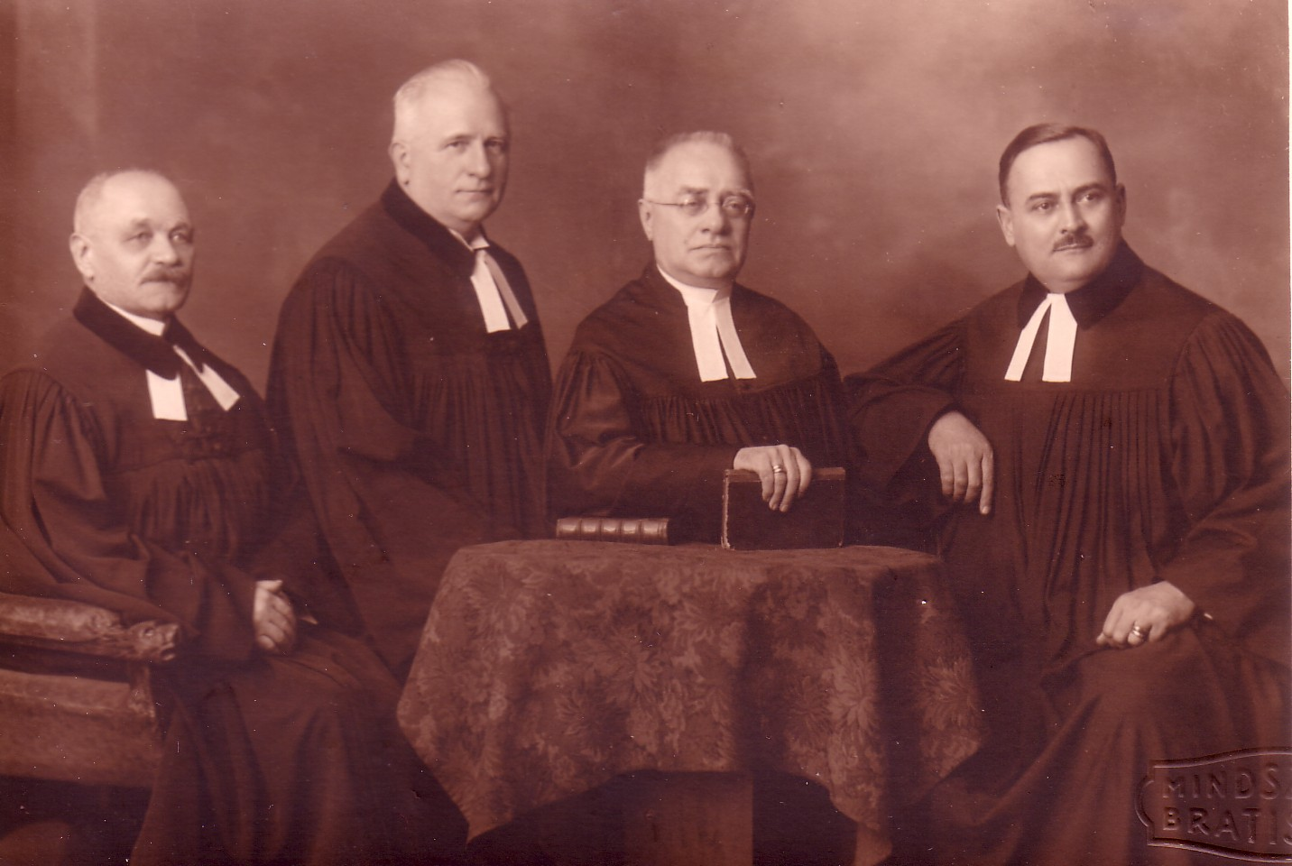 von links nach rechts: Adolf Okályi, D. Heinrich Pröhle, Senior Carl Eugen Schmidt, Wilhelm Rátz